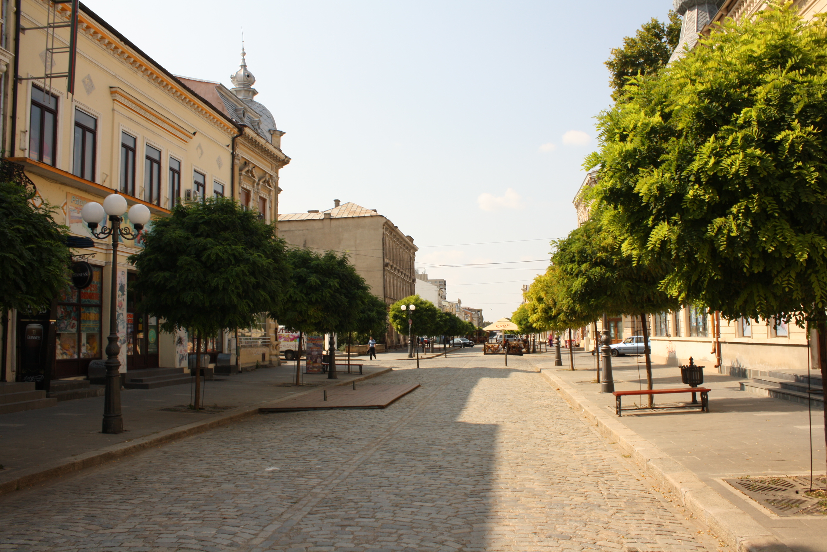 Centrul istoric al municipiului Brăila - str. Mihai Eminescu